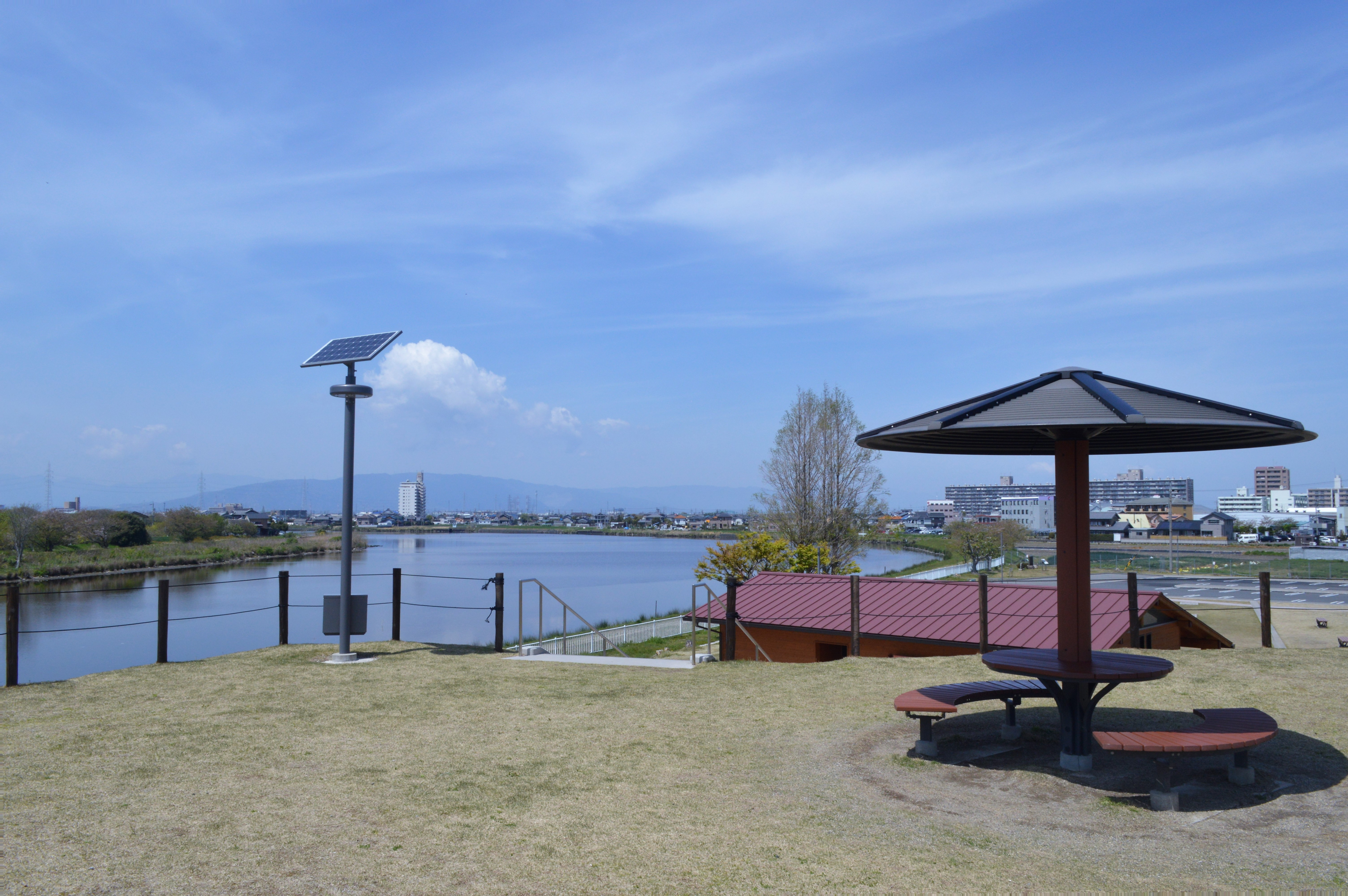 愛知県海部郡蟹江町にある「蟹江町希望の丘広場」。奥は善太川。